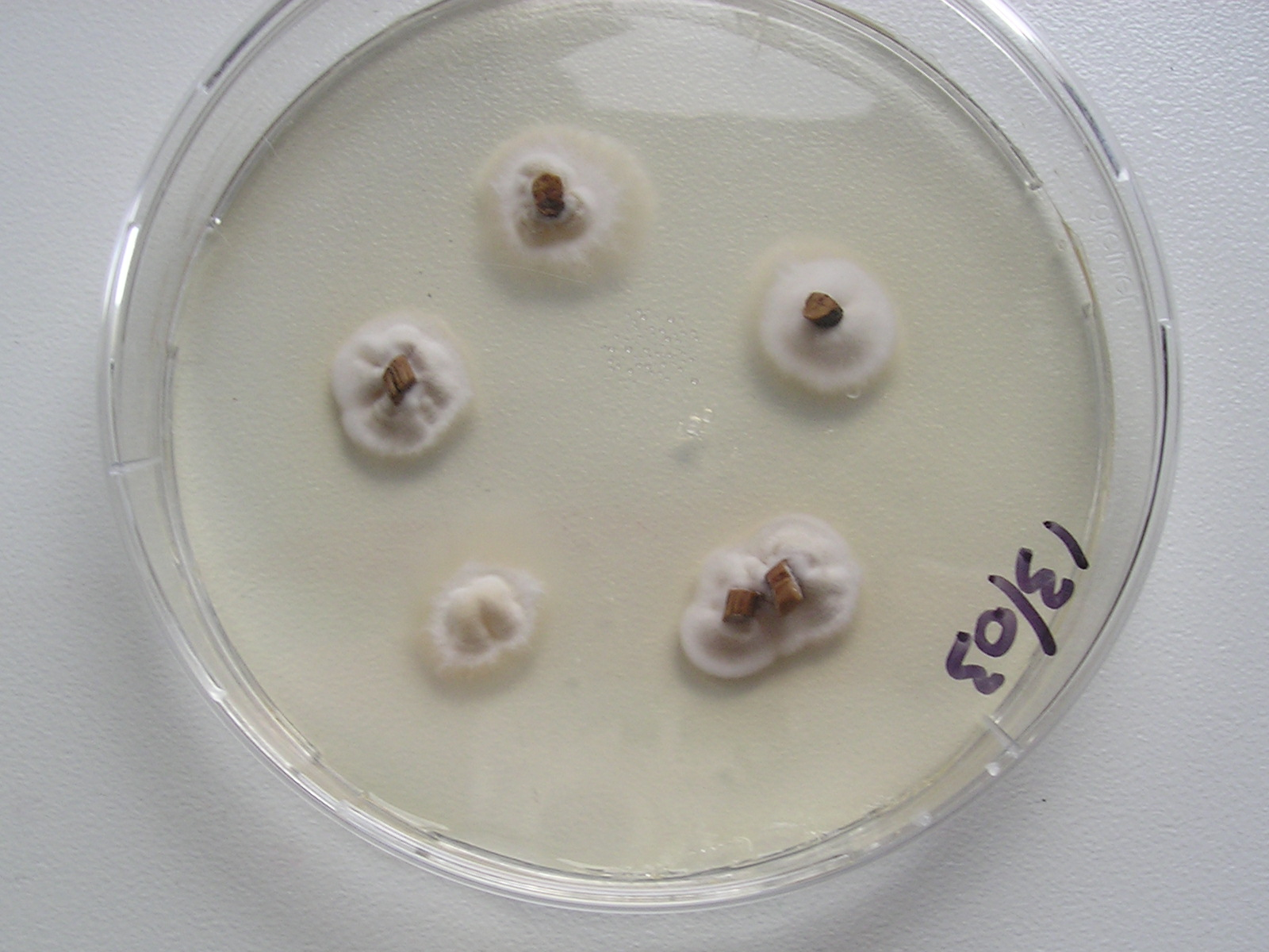 Culture de sclérotes de Claviceps purpurea sur milieu PDA